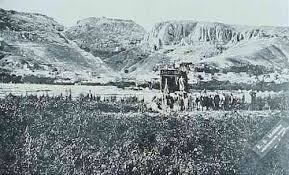 Hüsenik ve arkada Harput, Elazığ